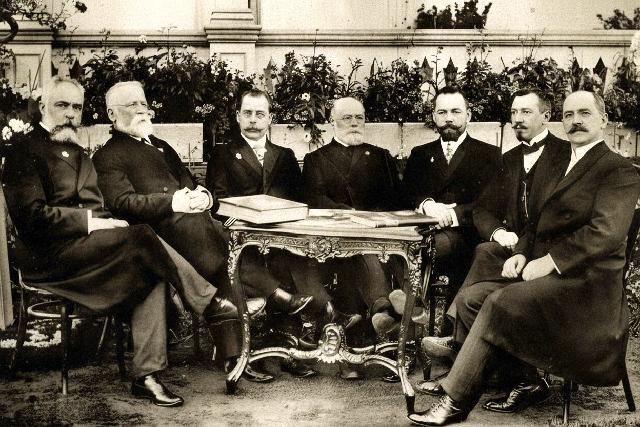 Директор Виктор Викторович Зотиков (четвертый слева) и члены Правления Раменской бумагопрядильной и ткацкой фабрики, 1912 год